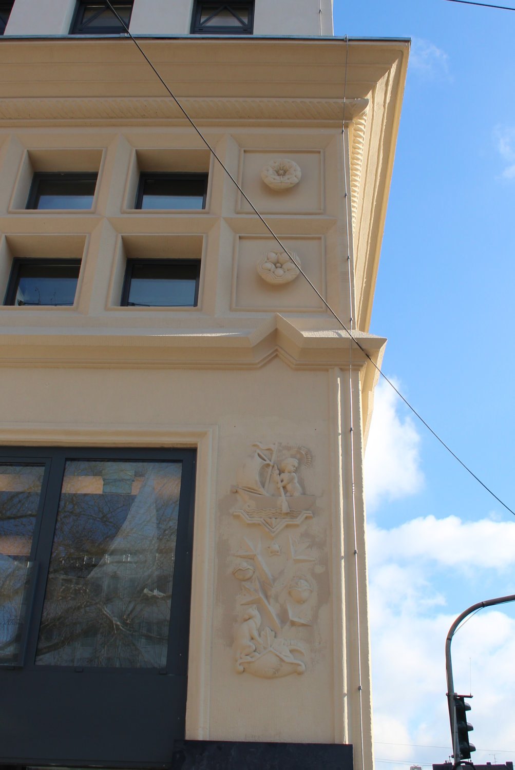 Ornamente am Industriehaus an der Schirmerstraße 80 in Düsseldorf